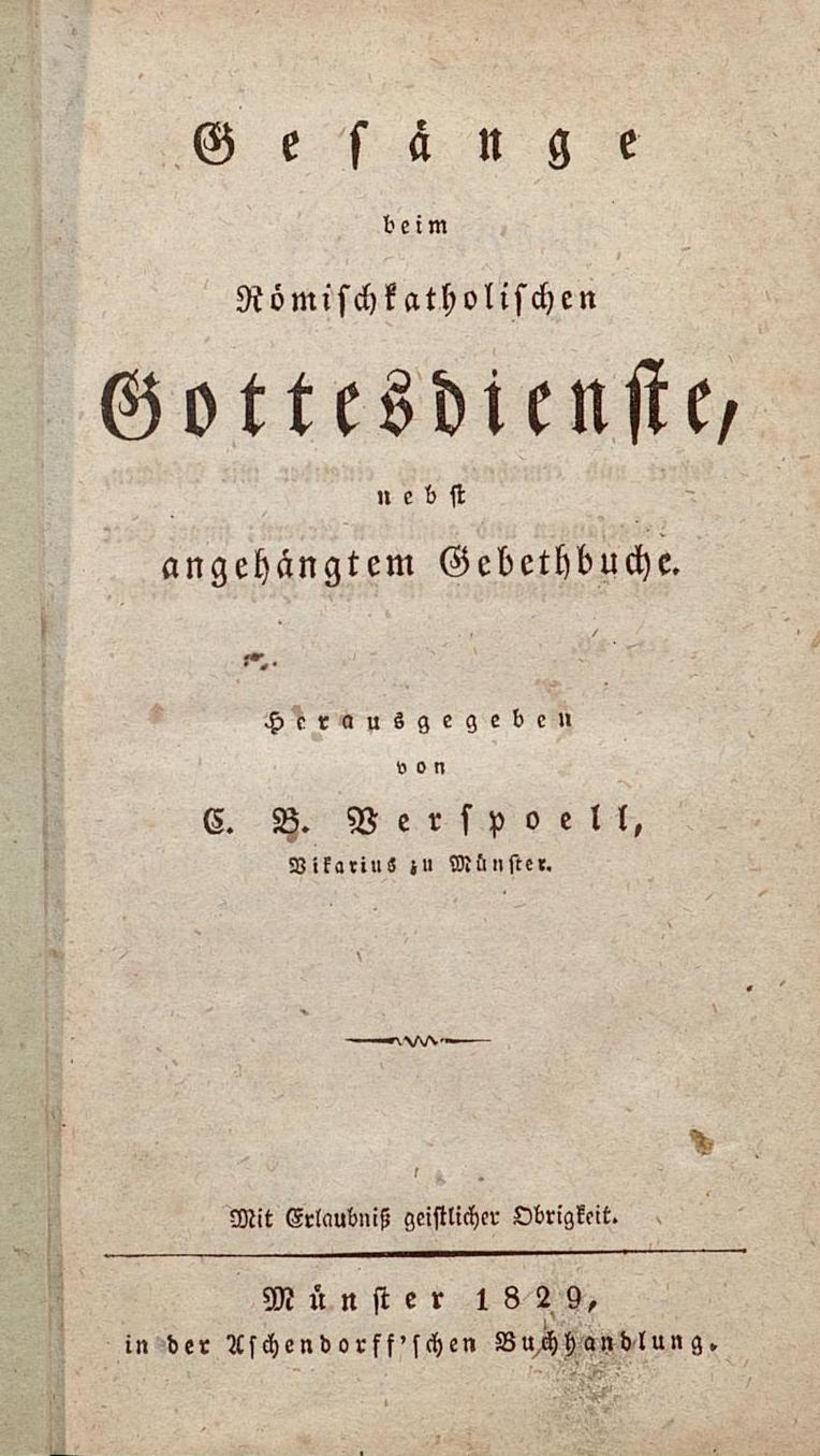 Christoph Bernhard Verspoell: Gesänge beim Römischkatholischen Gottesdienste, Auflage von 1829, Titelblatt